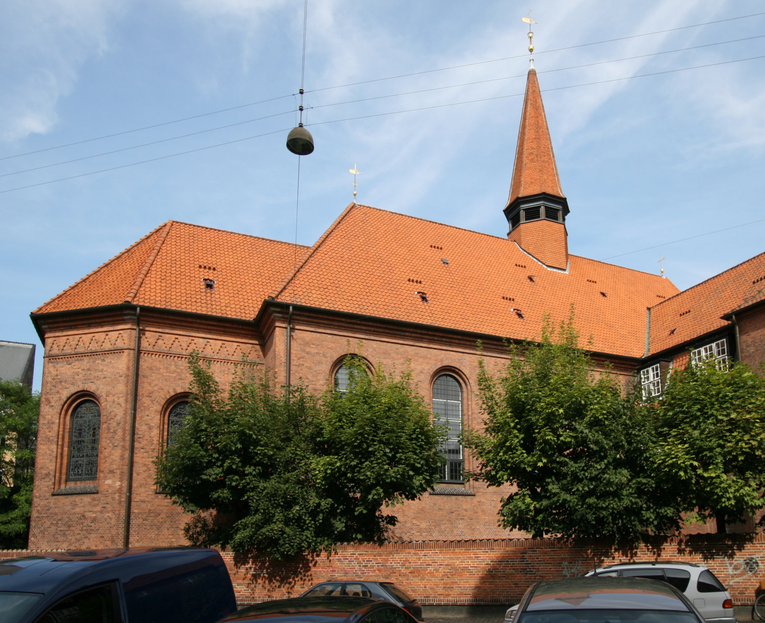 Luther Kirken in Copenhagen, Denmark.